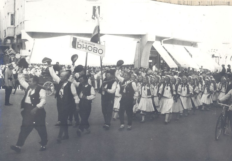 4-ти селскостопански културен и национален събор, 28 - 29 август 1938 г., гр. Варна. Парад на участниците в събора по ул. Княз Борис І. На преден план са представителите на община Сяново.